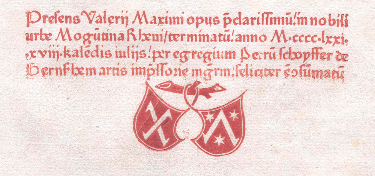 Druckermarke von Peter Schöffer, ehemals Geselle Gutenbergs, am Schluss seines Drucks (Excipit) des “Valerius Maximus” von 1471; Bibliothek des Christianeums Altona